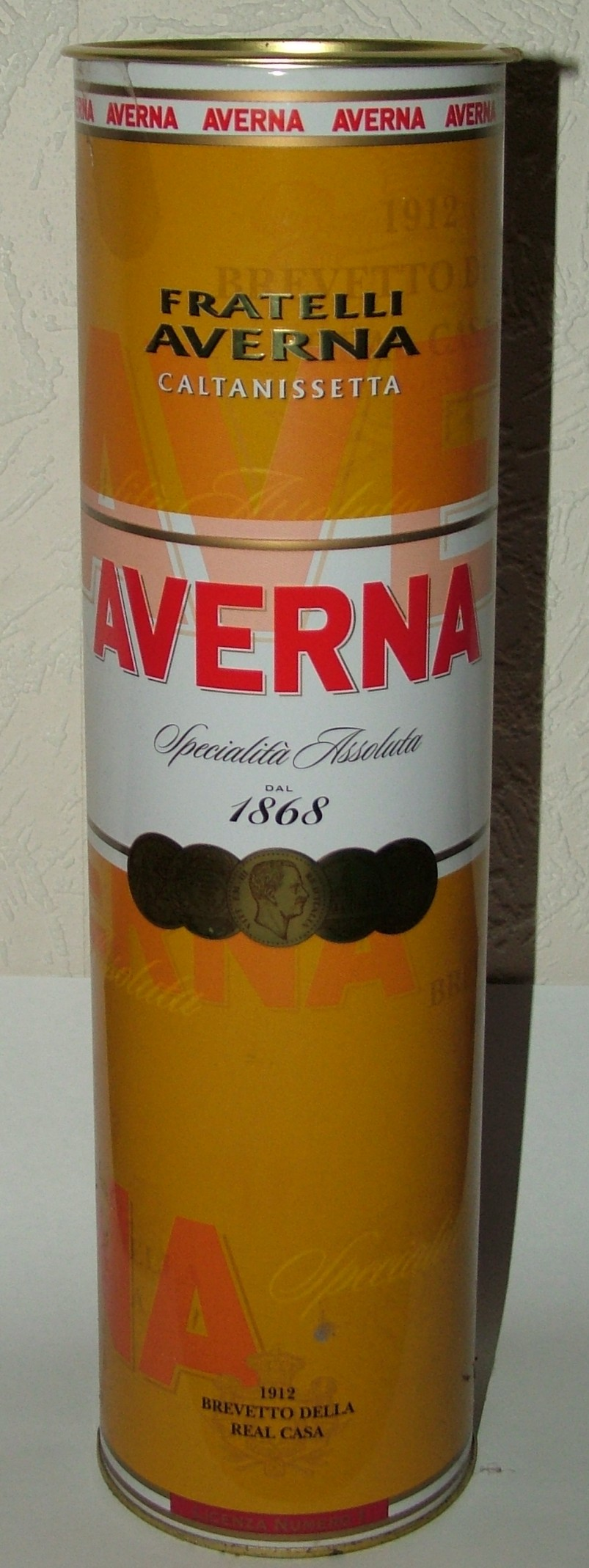 Eine Verpackung aus Blech für eine Averna Flasche (aus Caltanissetta)